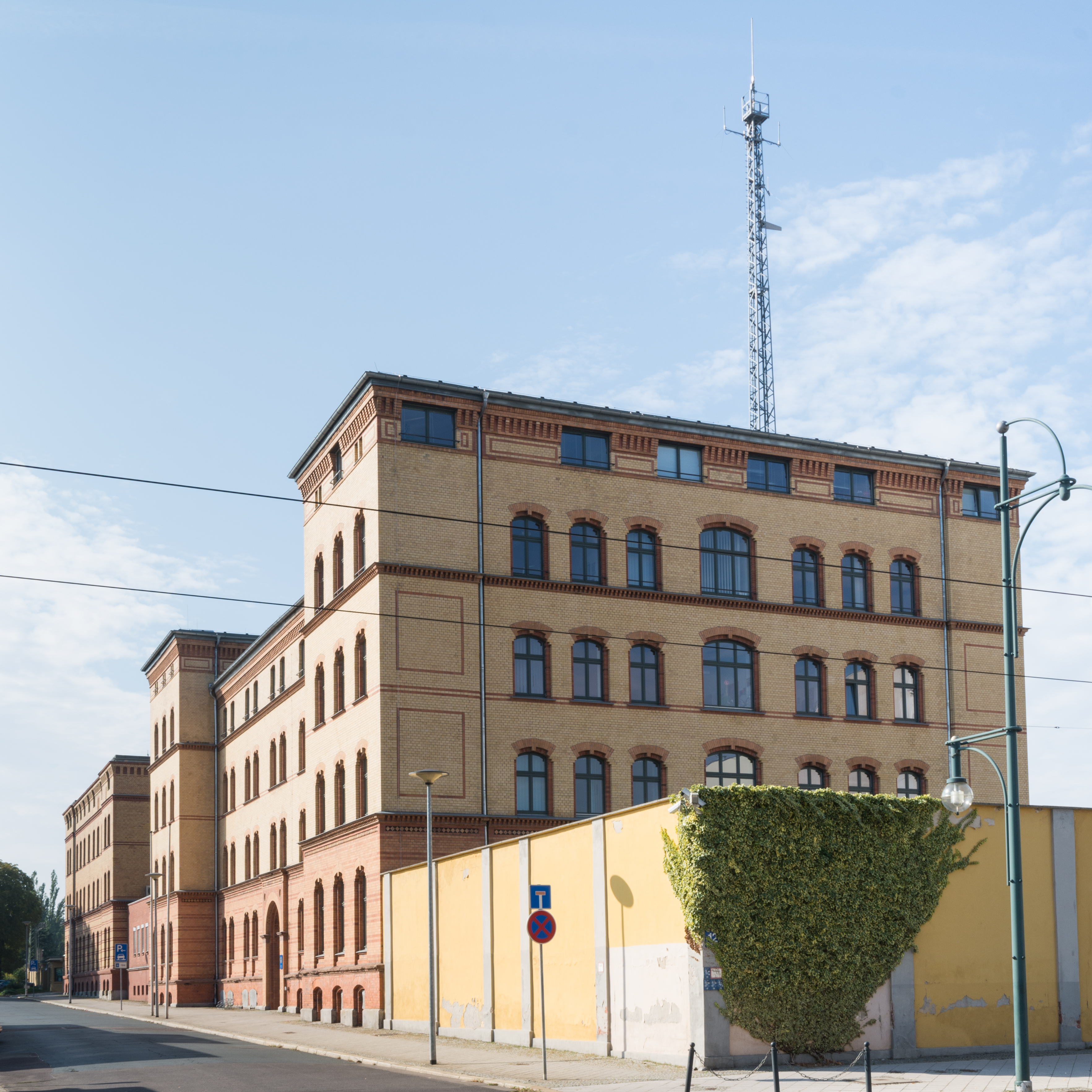 Kasernenbau Sternstraße 12 in Magdeburg-Altstadt, Blick entlang der Straße Am Buckauer Tor. This is a photograph of an architectural monument.It is on the list of cultural monuments of Magdeburg